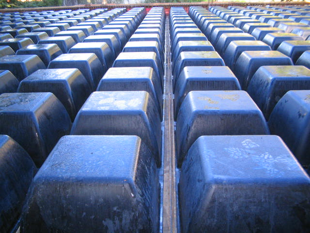 Foto das fôrmas para Laje Nervurada